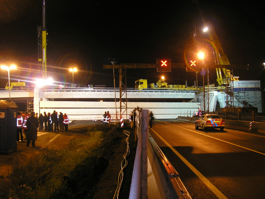 Testen van de waterkering